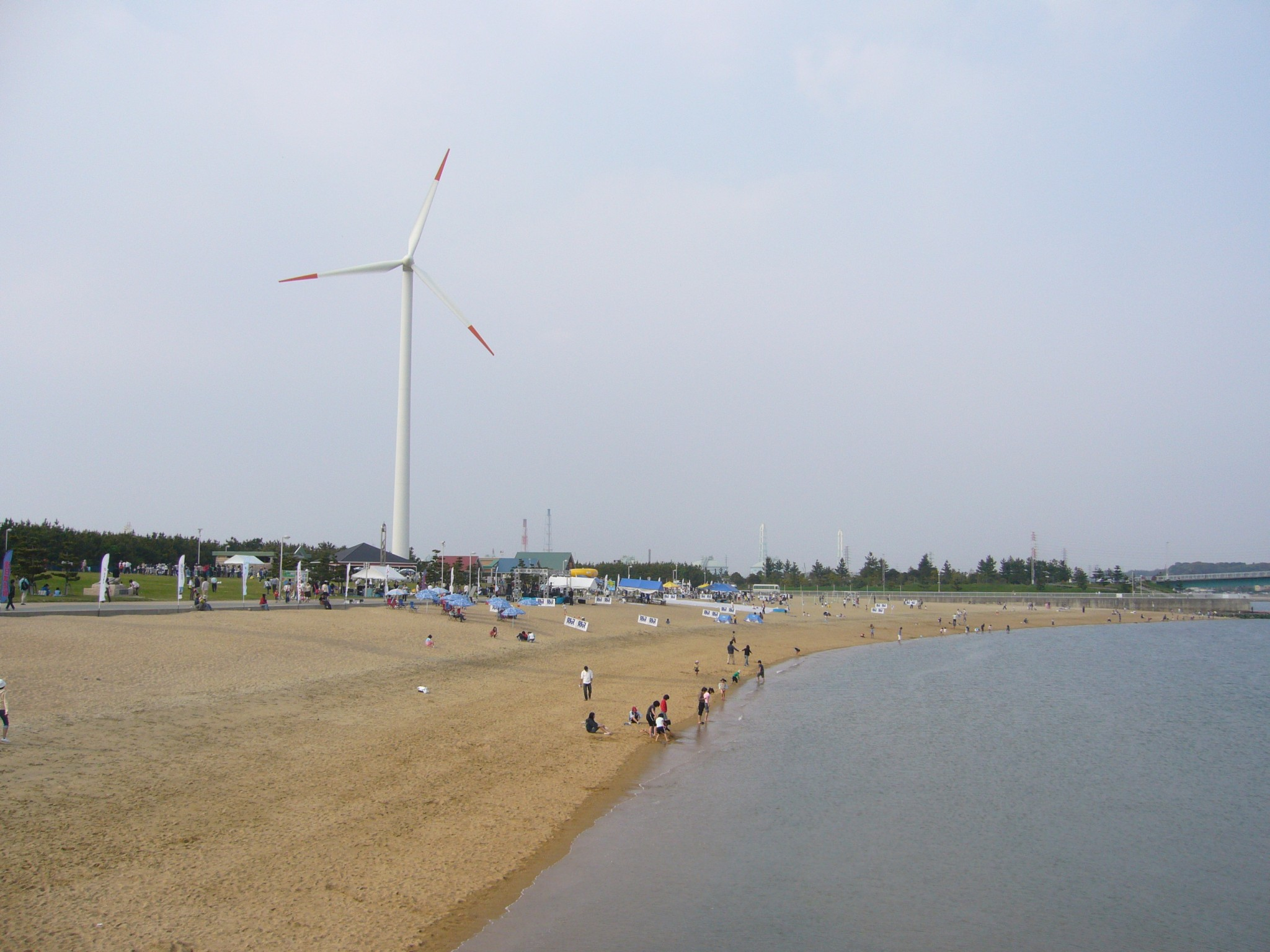 新舞子マリンパーク (愛知県知多市緑浜町)